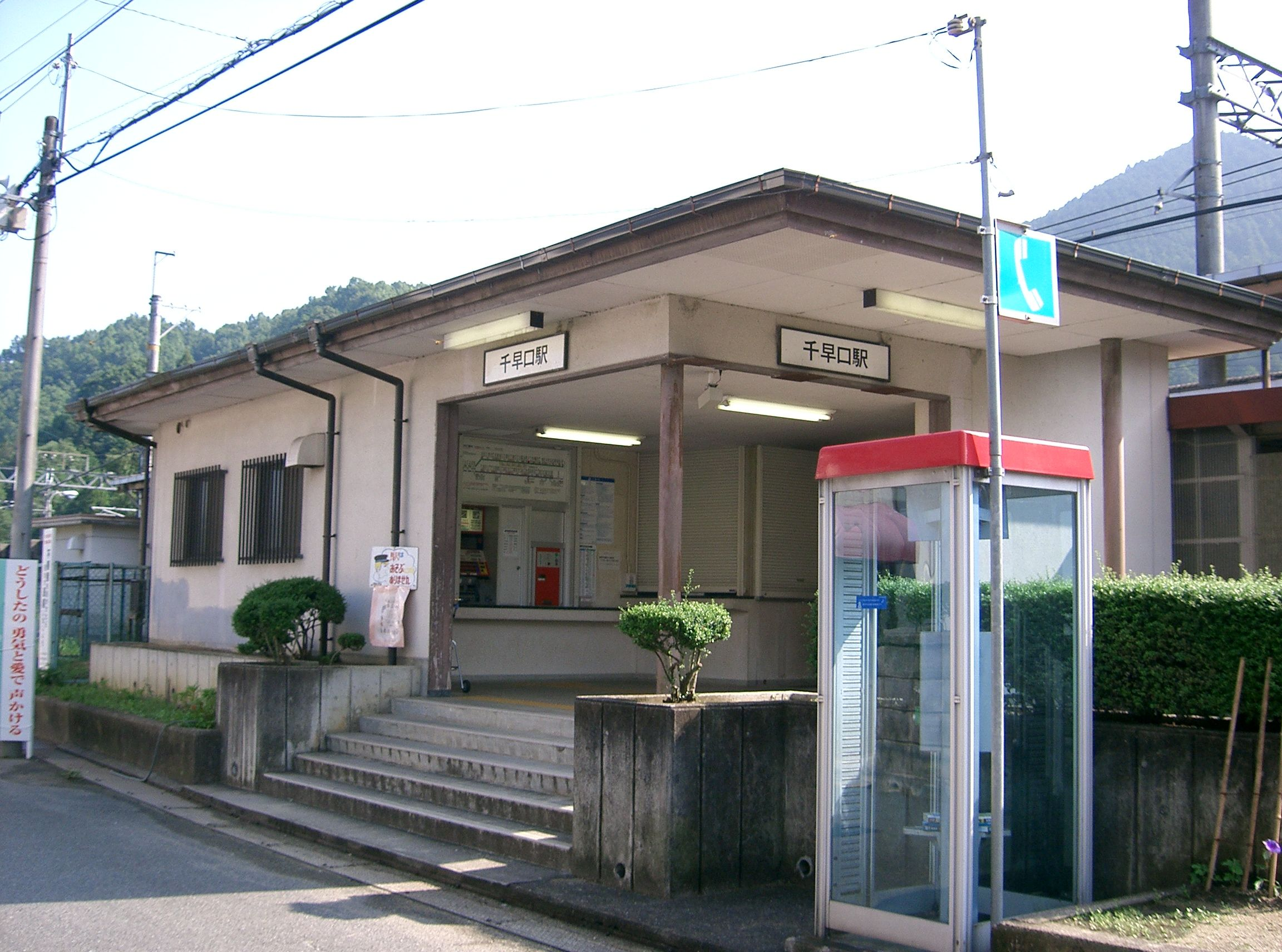 千早口駅